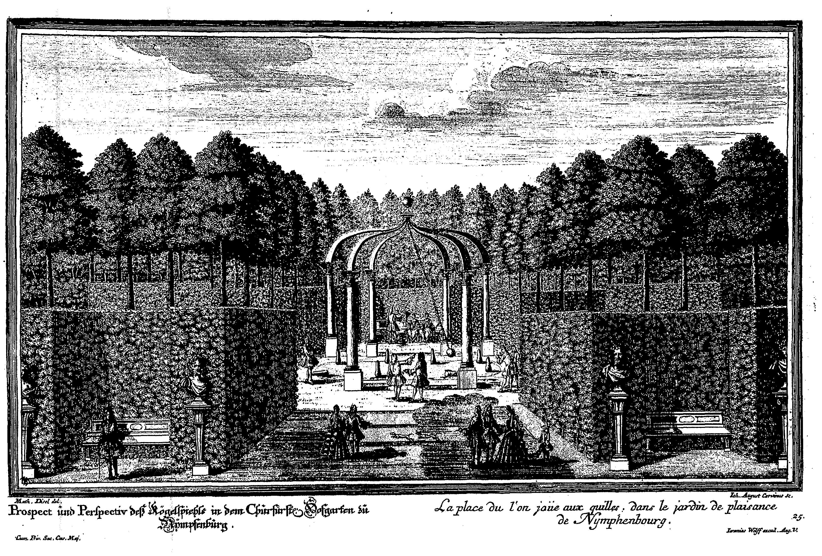 Kupferstich